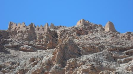 بقایایی از قلعه گرد کوه